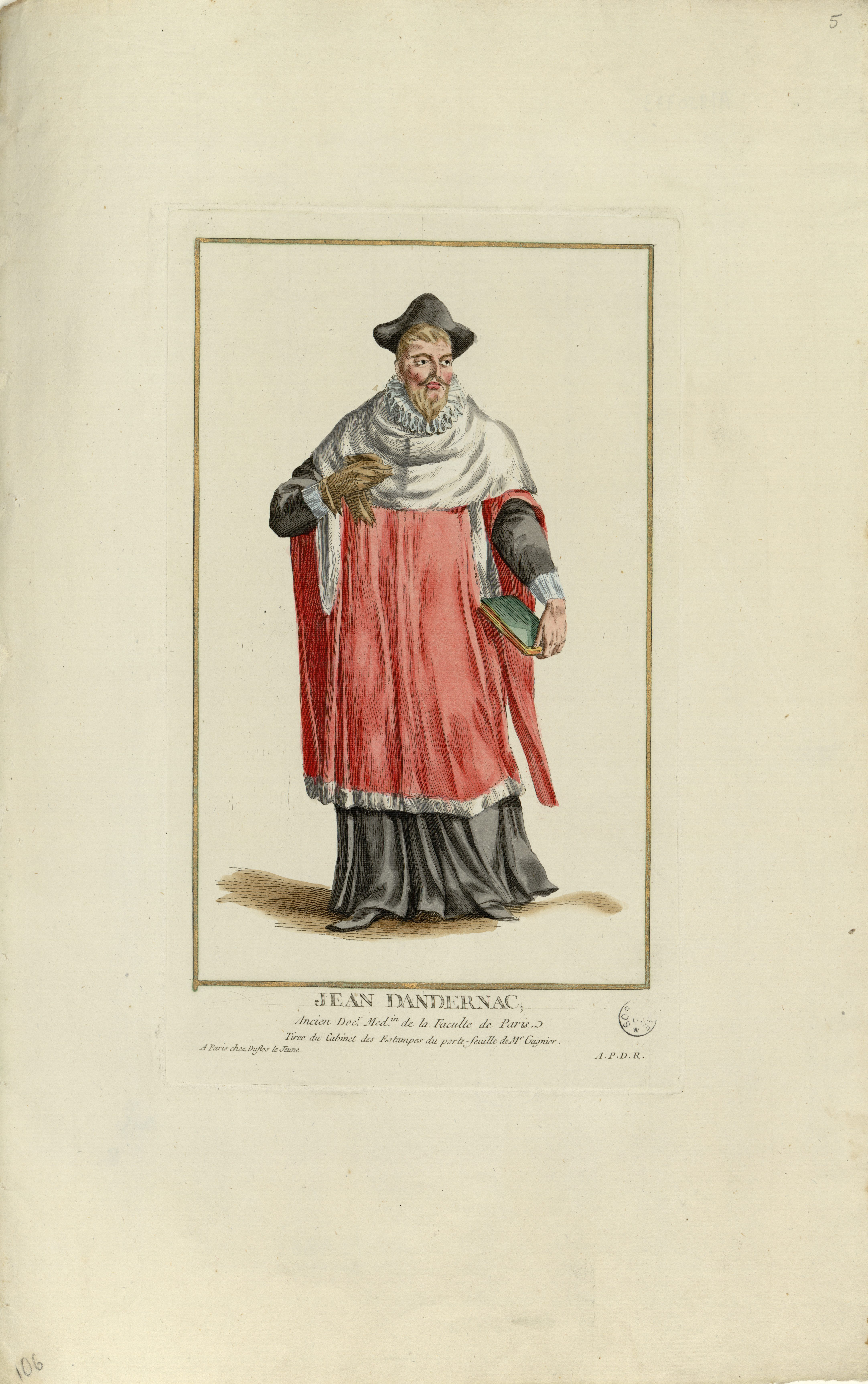 Estampe